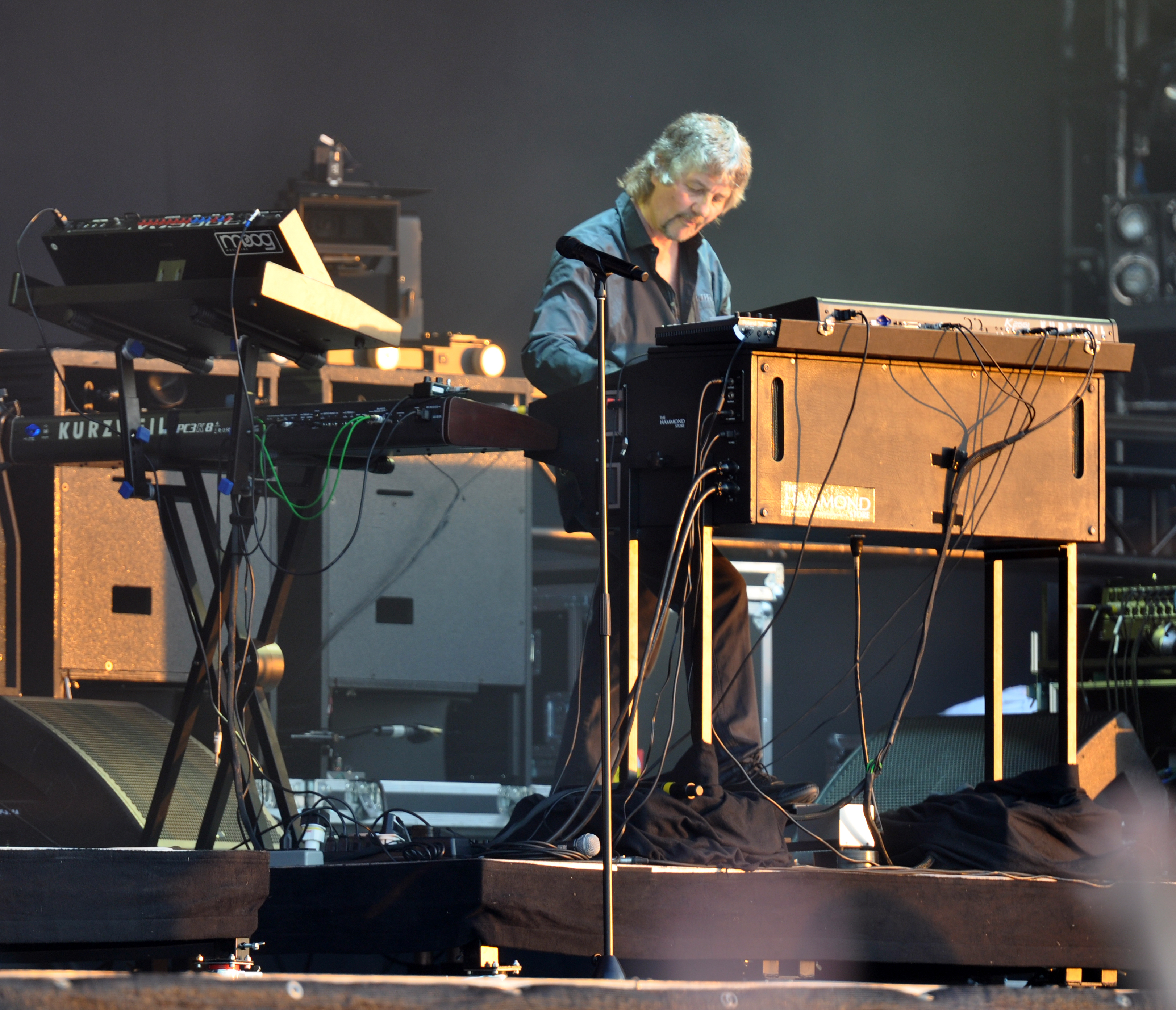 Deep Purple at Wacken Open Air 2013